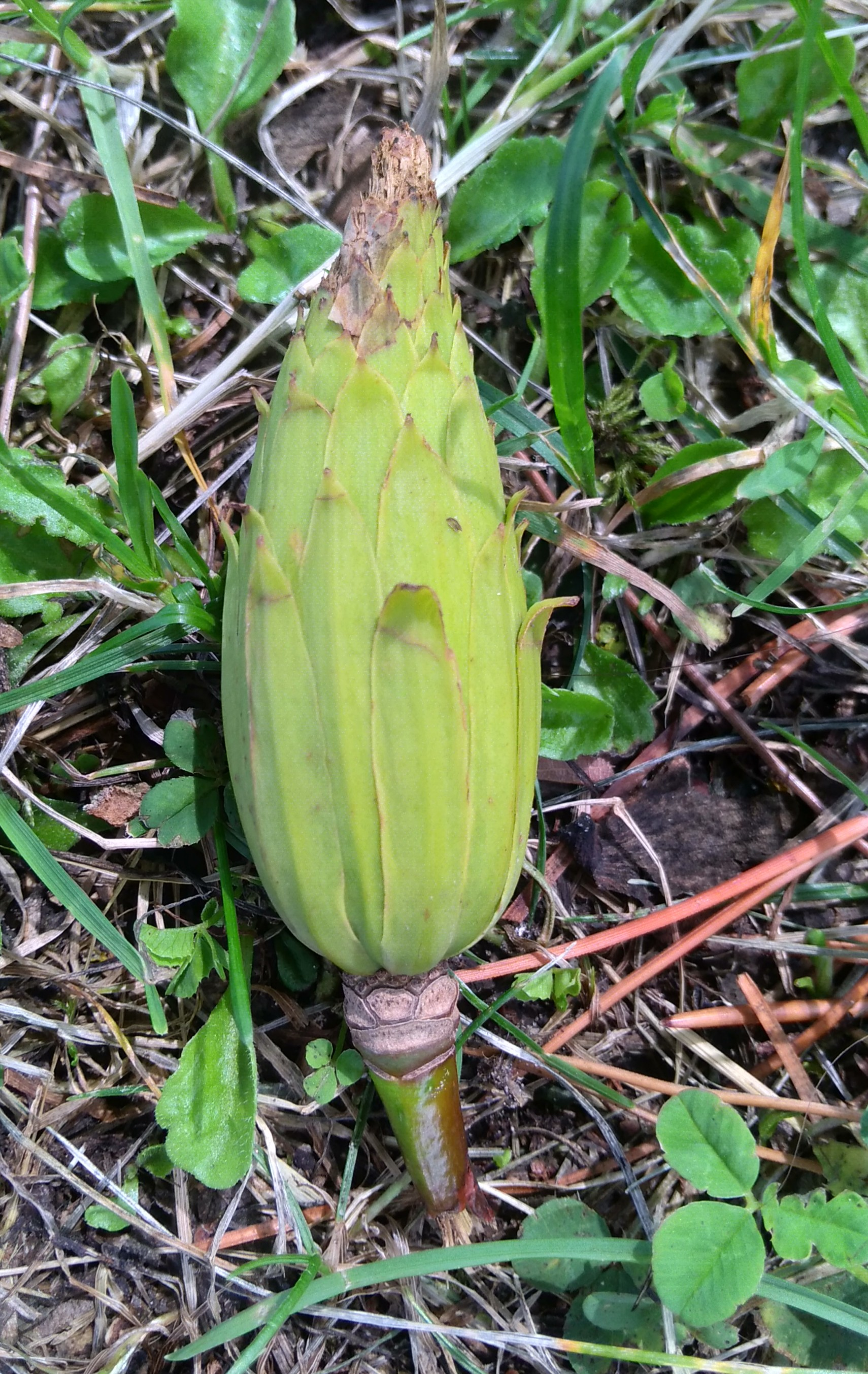 Fruit du tulipier de Virginie, photographié au bosquet de la Reine, parc du château de Versailles, août 2019